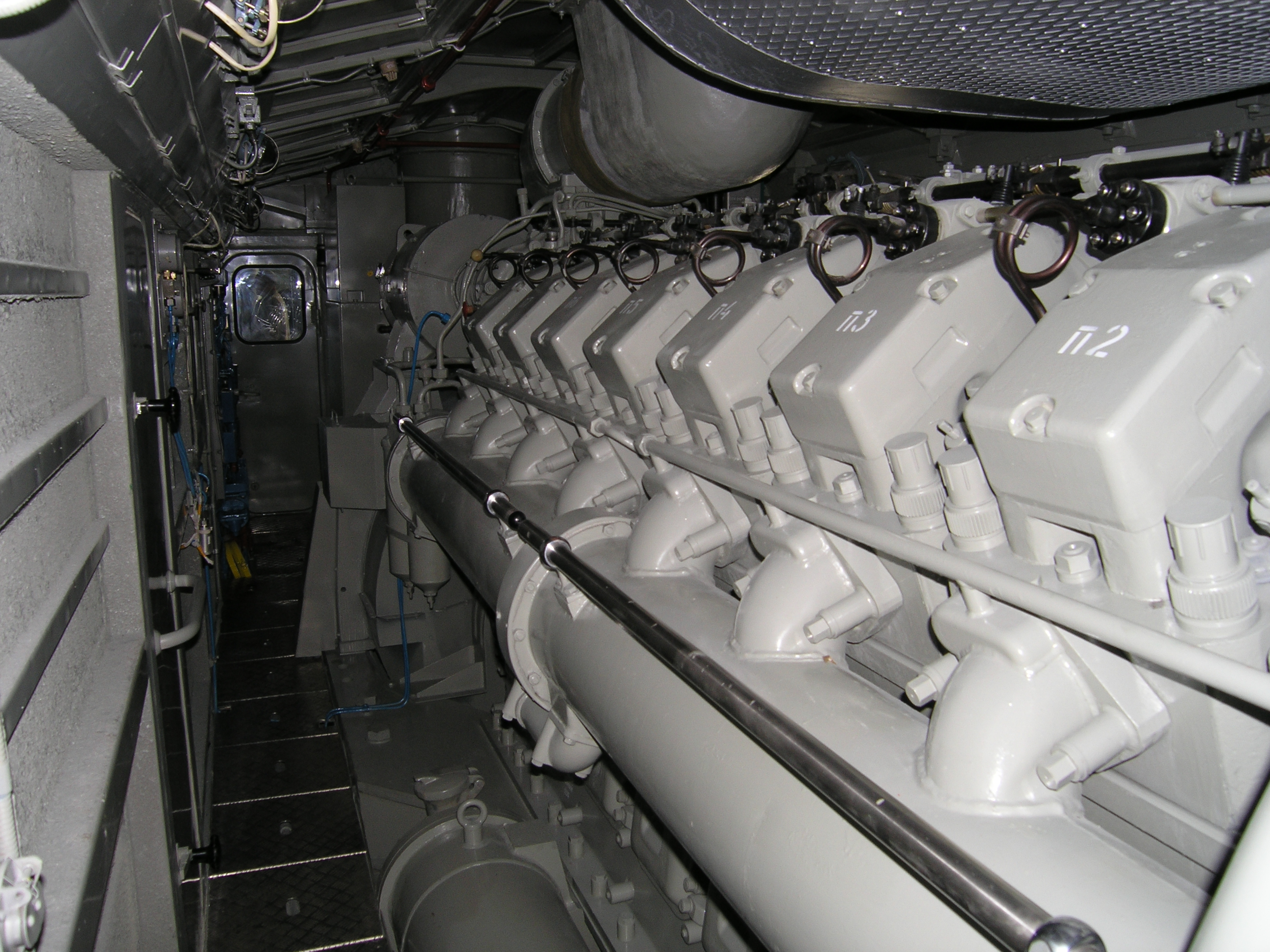 Тепловоз ТЭП150 - Дизель-генератор.